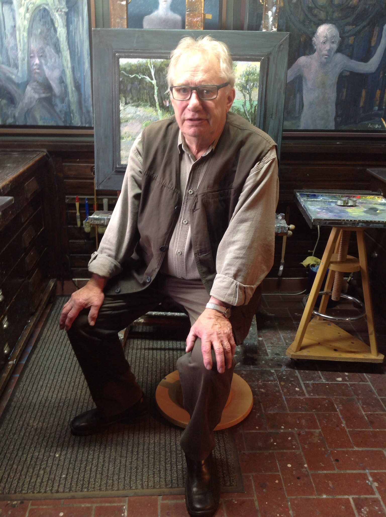 Der Maler und Grafiker Siegfried Ratzlaff in seinem Atelier in Leipzig